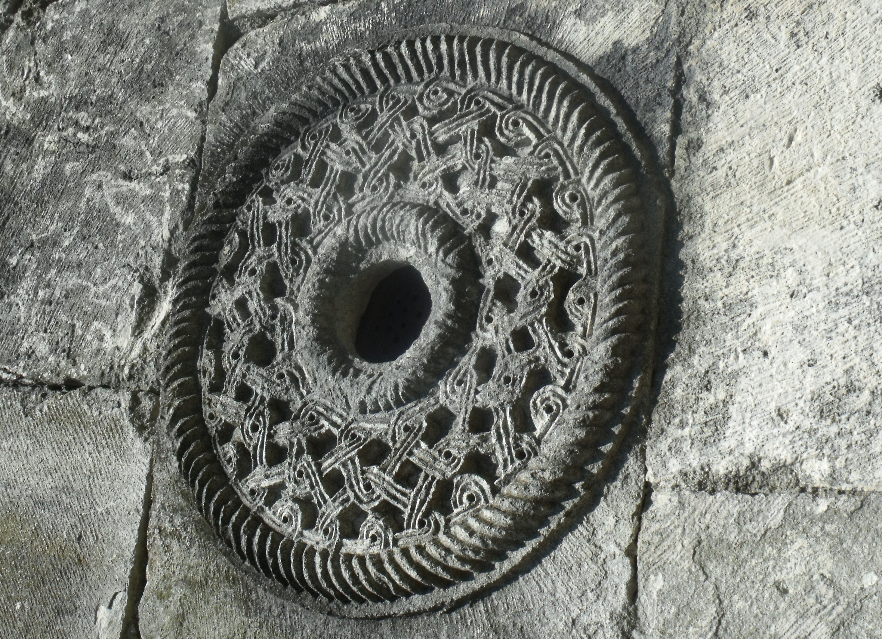 ცაიშის საკათედრო ტაძრის კედლის ფრაგმენტი